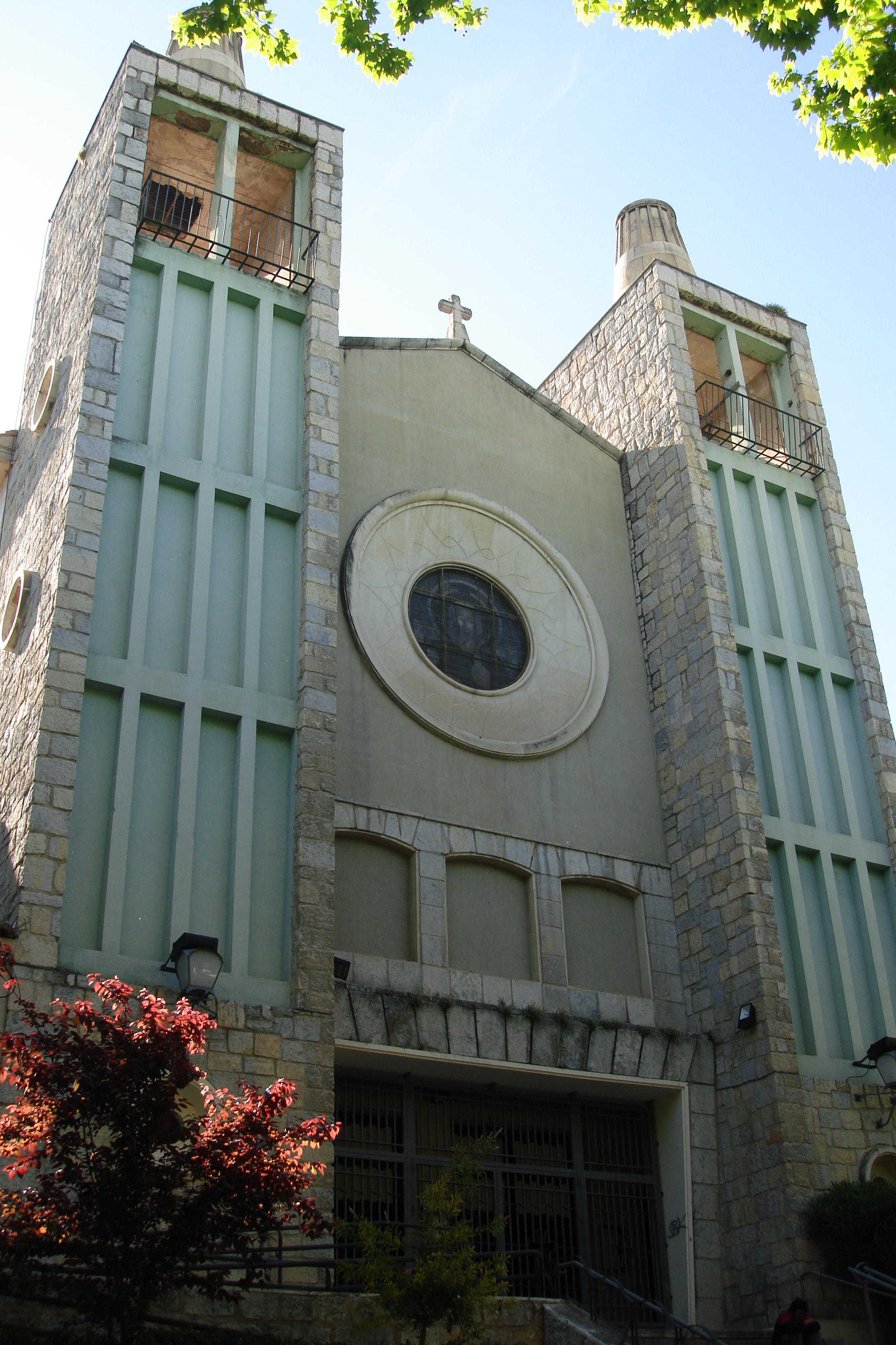 Fachada de la Iglesia de Cristo Rey, en el Paseo de la Estación de la ciudad de Jaén, España.